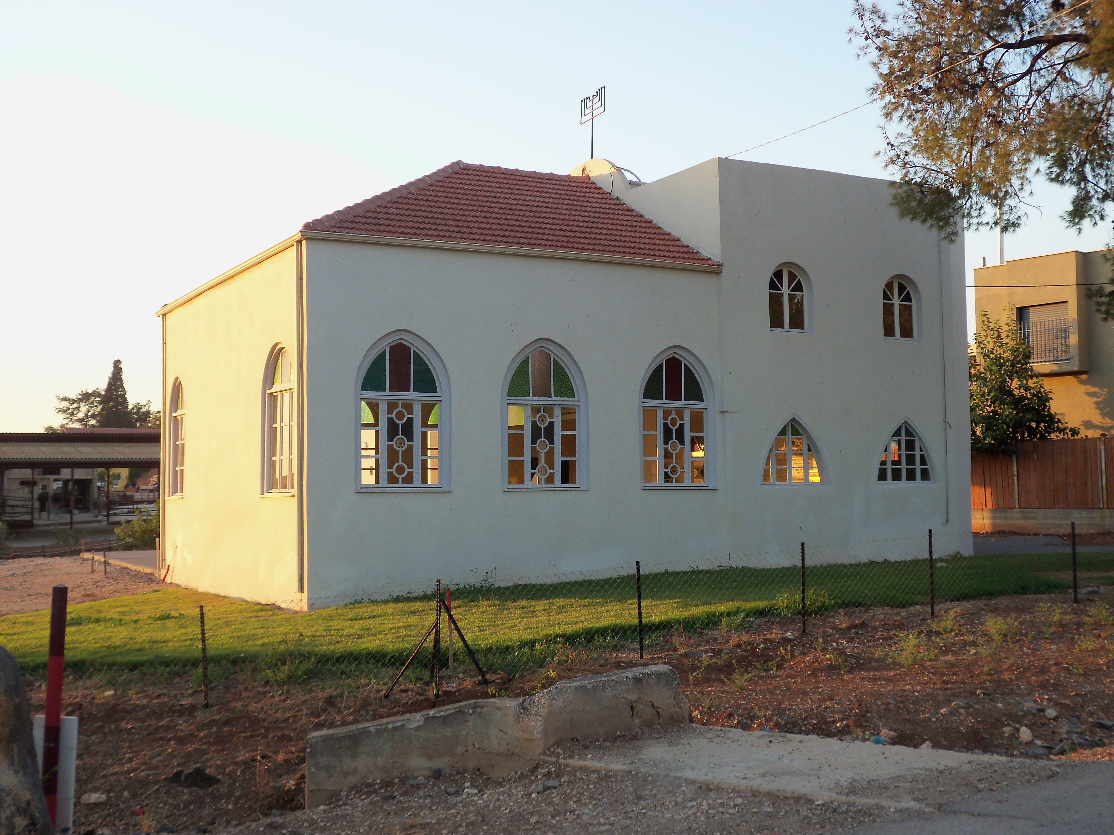 בית הכנסת כפר יחזקאל